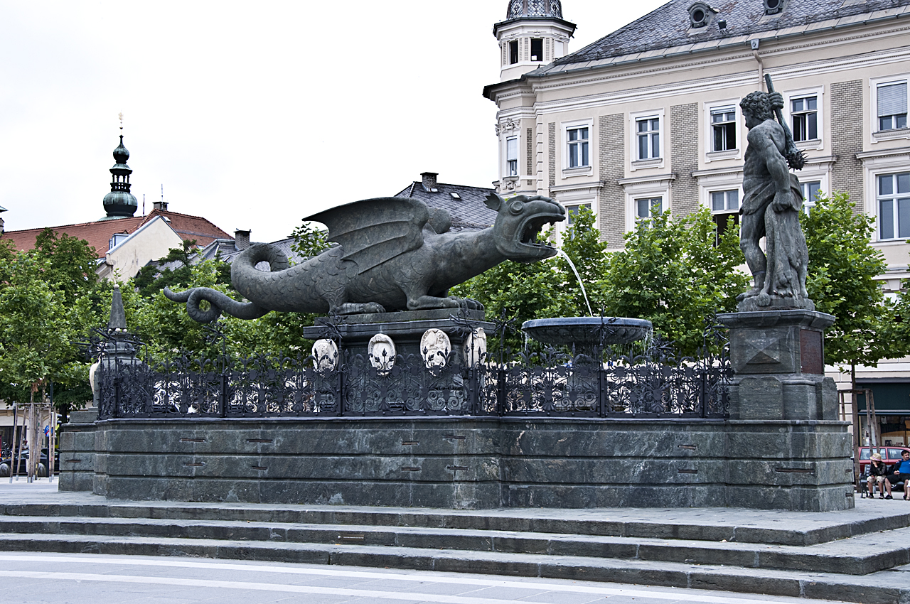 Lindwurmbrunnen in Klagenfurt, 2009